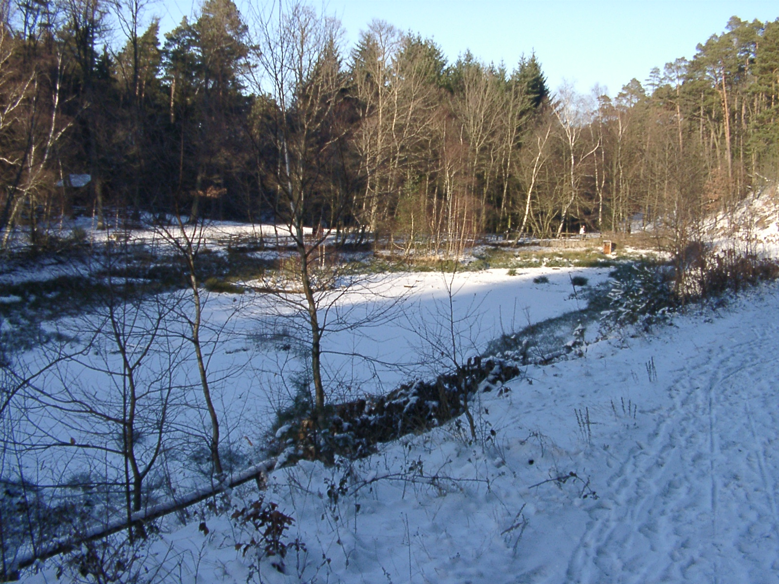 Der Ungeheuersee im Pfälzer Wald